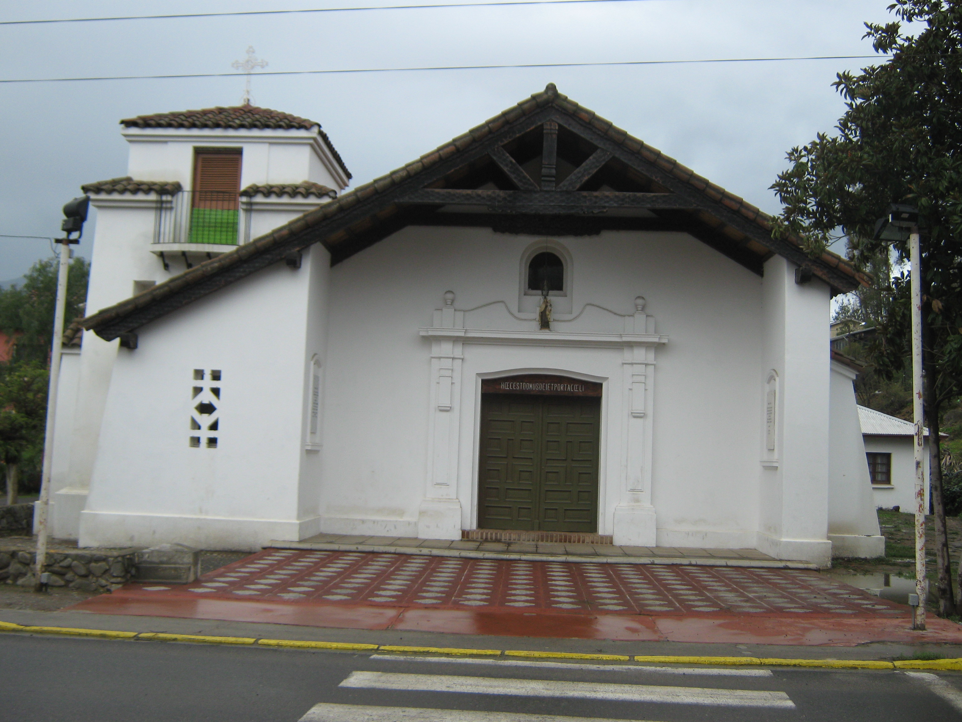 Capilla La Carmelita La Punta Mostazal